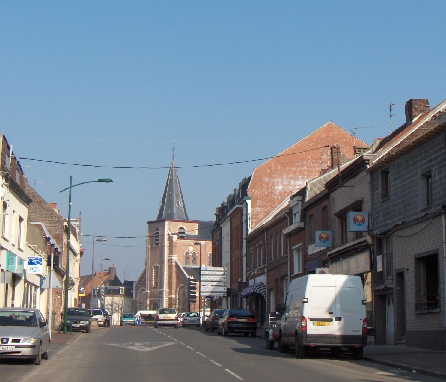 Roncq (France, dépt. Nord), centre ville (route de Lille/la nationale 17), vue du sud.